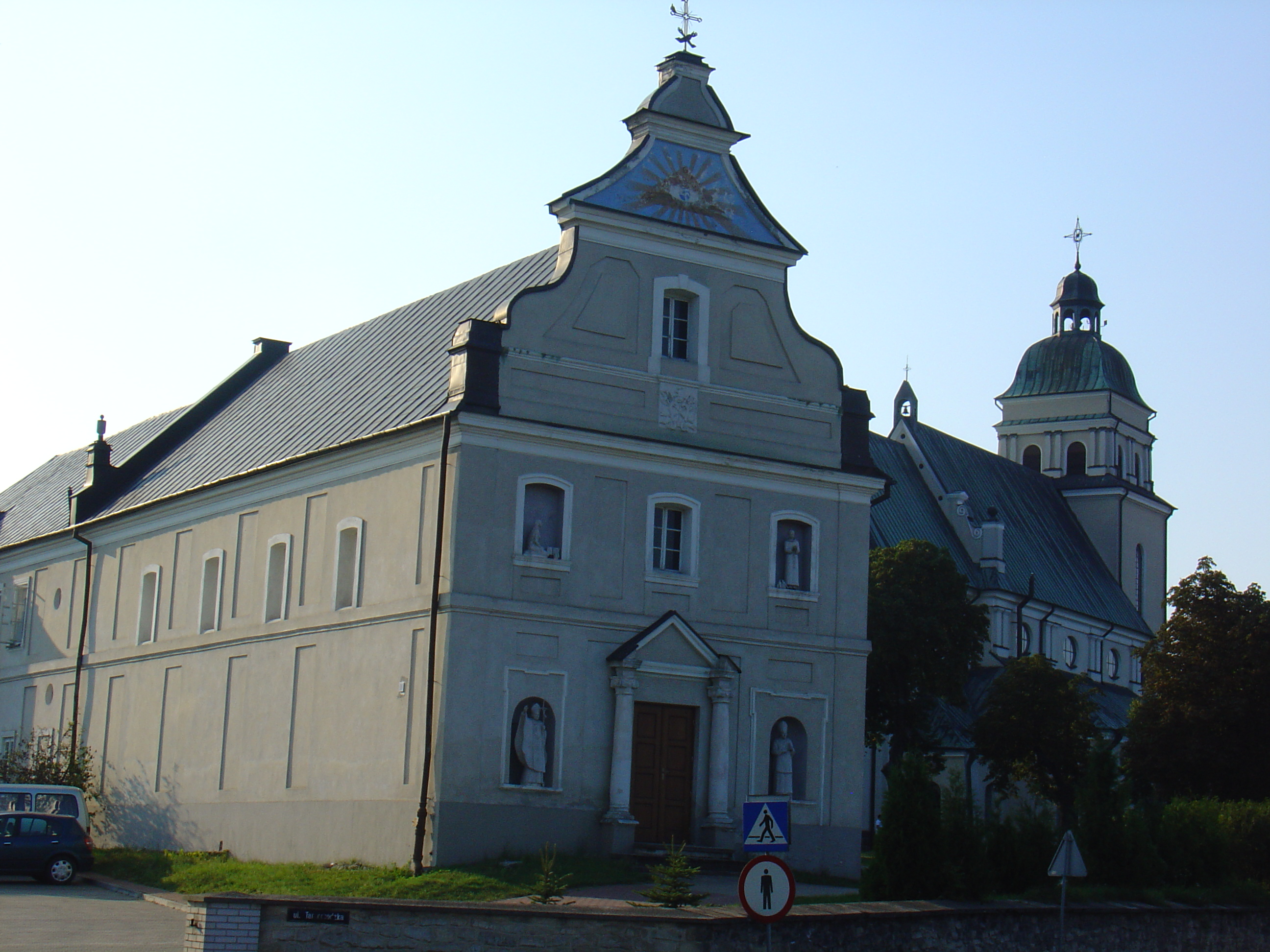 D. zespół klasztorny franciszkanów „w Puszczy”: - kościół, ob. par. p.w. św. Marii Magdaleny (1921-1928) - kaplica p.w. św. Marii Magdaleny (1794) - dzwonnica (XVIII) - klasztor, ob. plebania (4 ćw. XVIII) Puszcza Solska, ul. Krzeszowska 1, miasto Biłgoraj